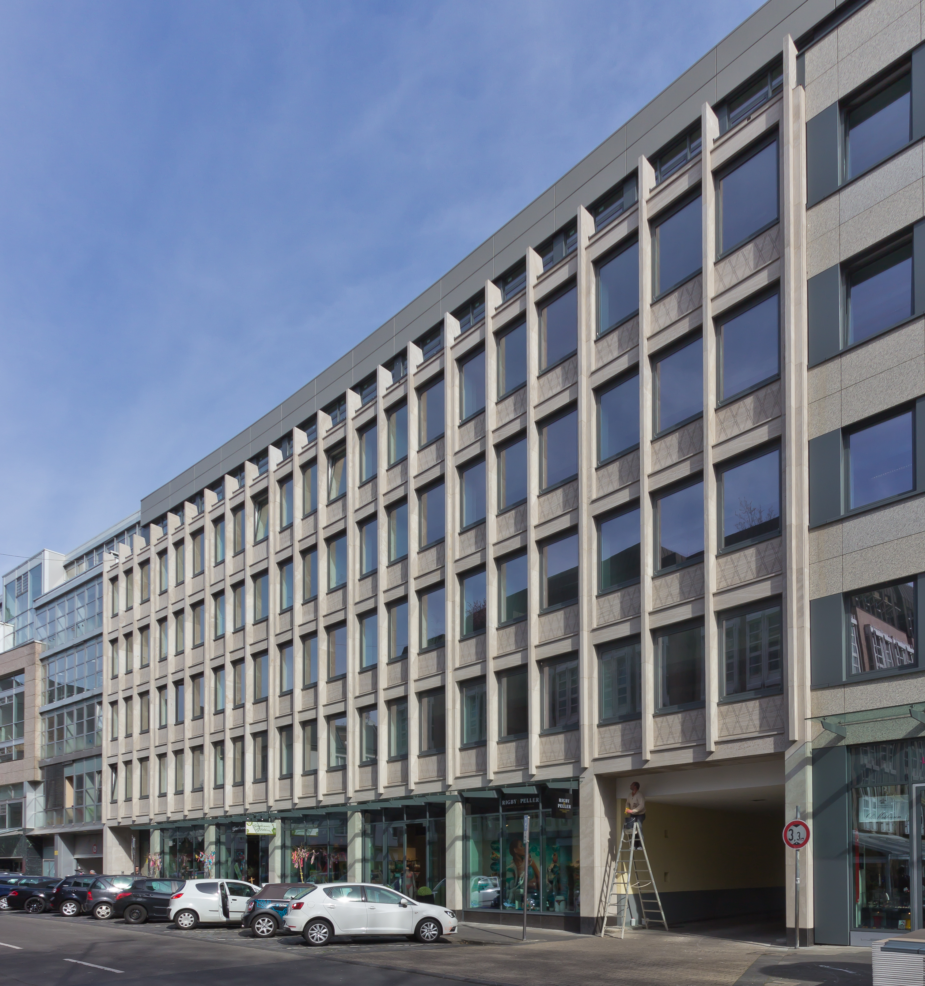 Büro- und Geschäftshaus Ludwigstraße 6. Erbaut 1953-55, Westdeutsche Landesbank Girozentrale (ehemals Rheinische Girozentrale und Provinzialbank Köln), Architekt: Hans Schumacher